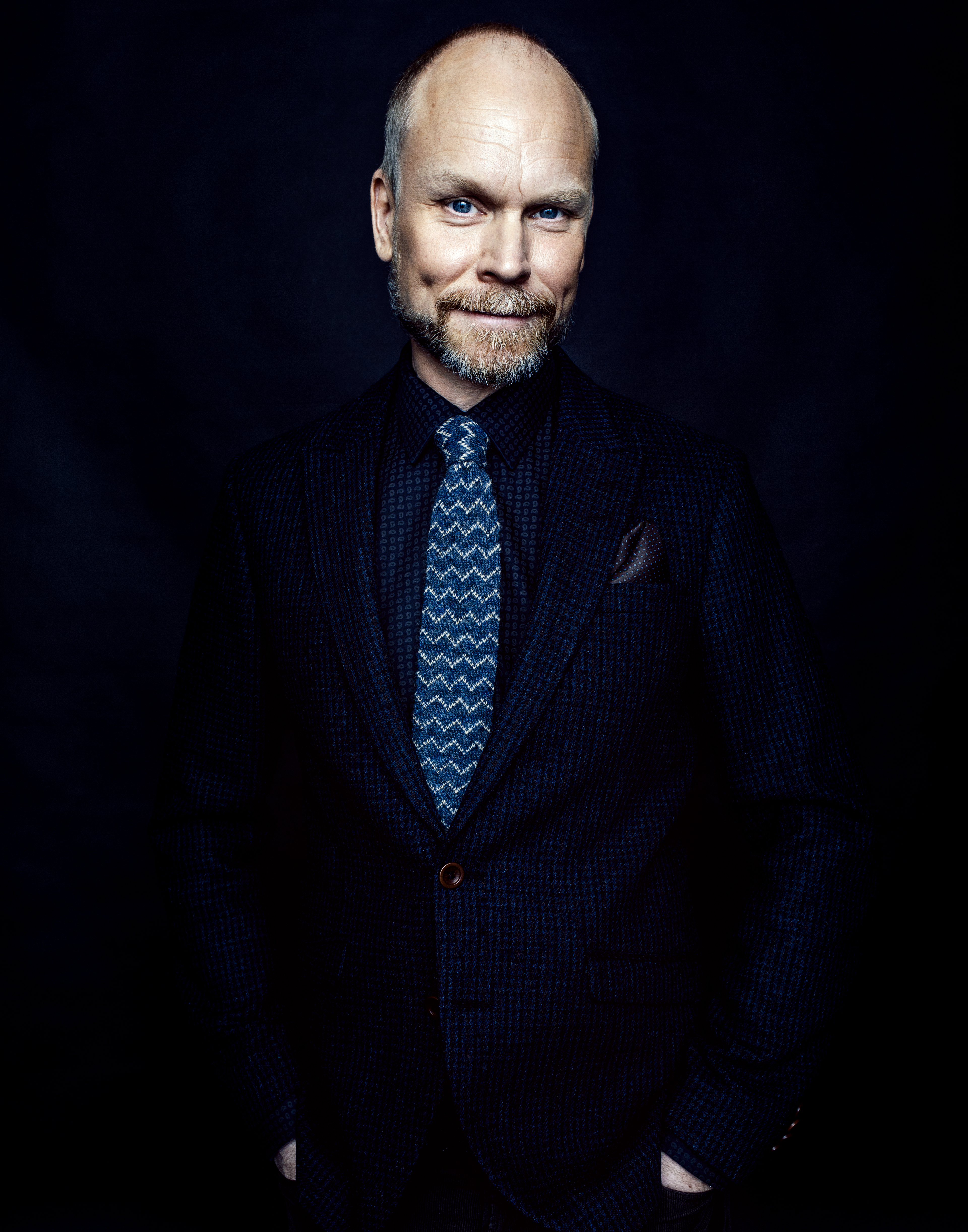 Programledaren Kristian Luuk.